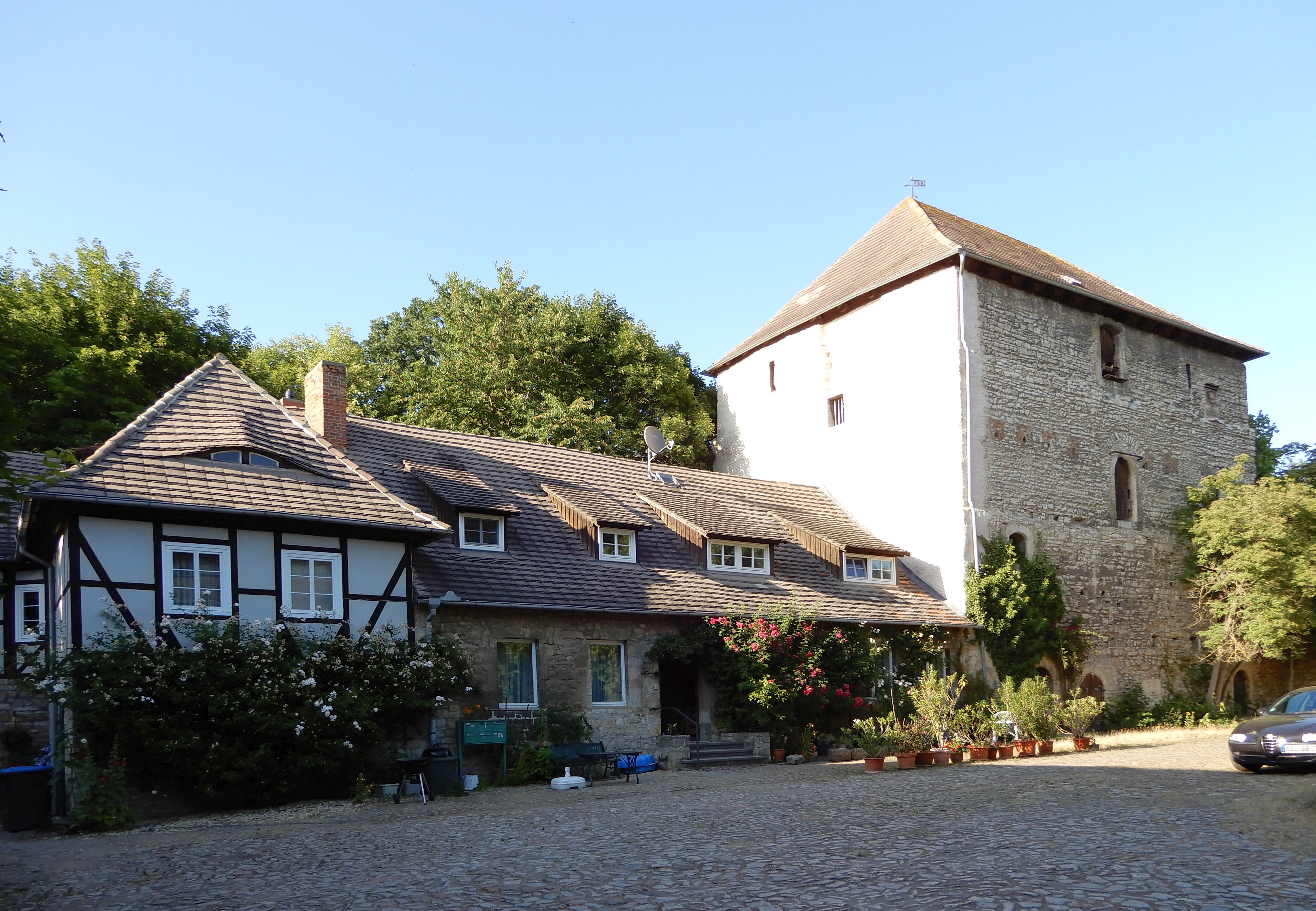 Gatersleben, Gutshof